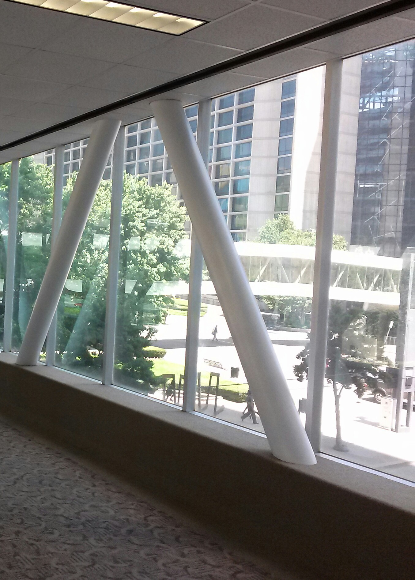 Puente peatonal que interconecta la Plaza de las Américas con otros edificios